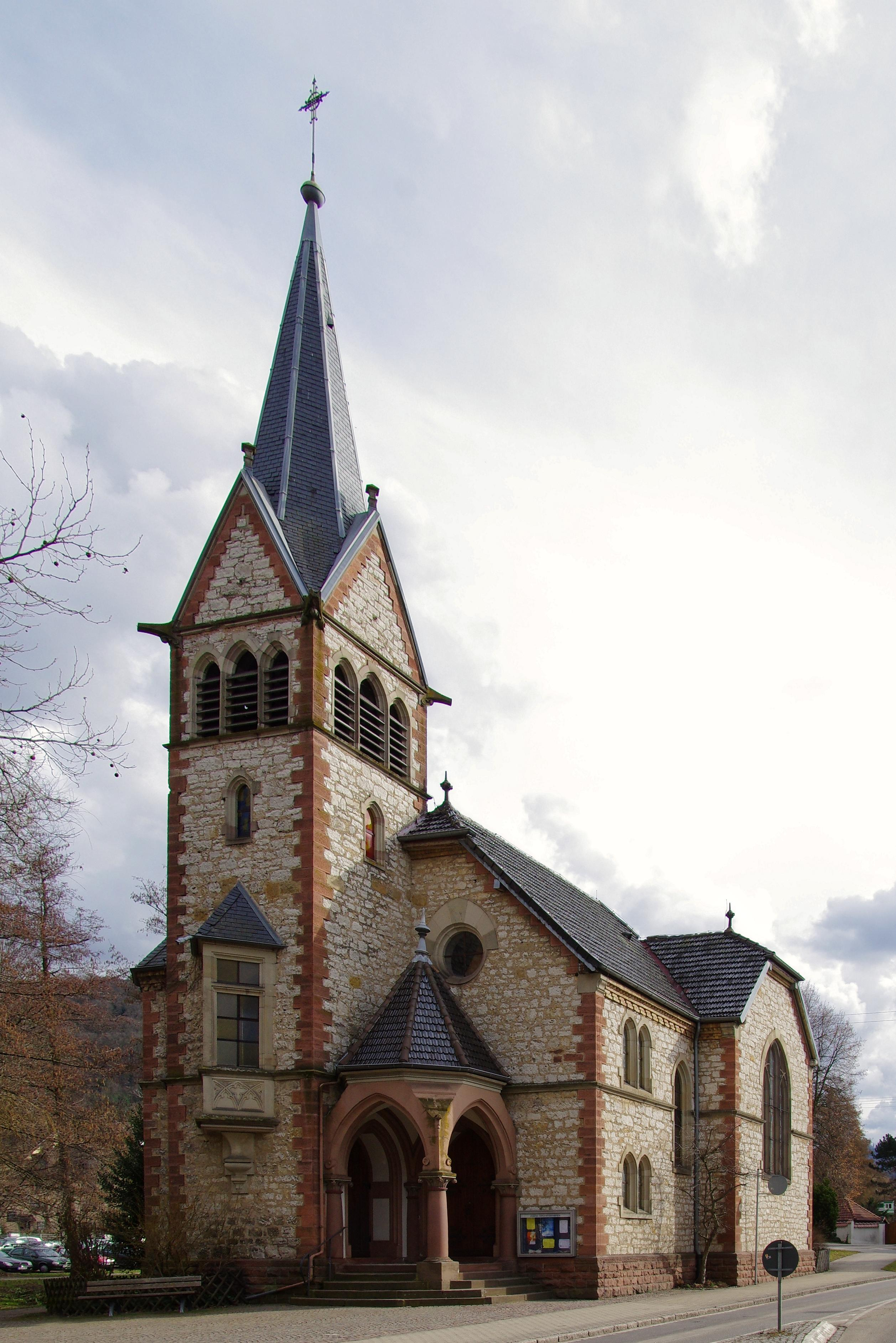 Aussenansicht der Martin Luther Kirche in Staufen im Breisgau